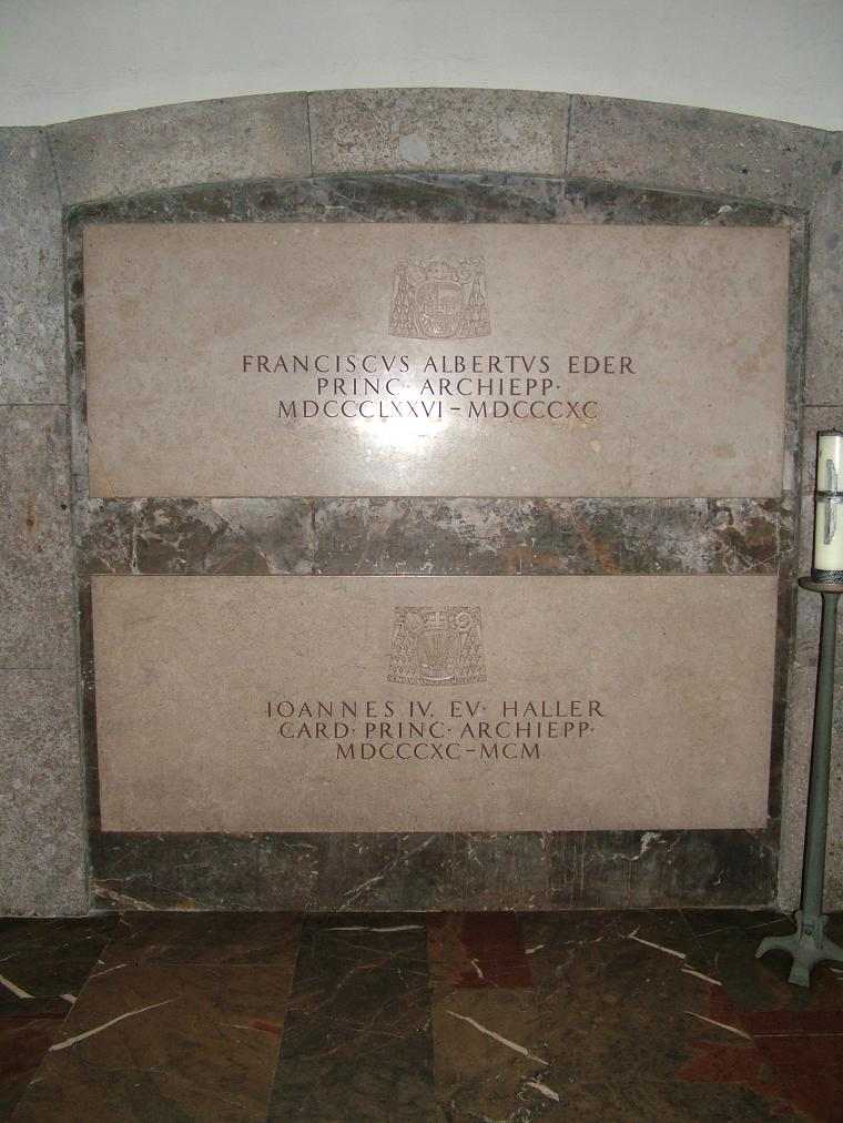 Salzburger Dom, Gräber der Erzbischöfe Eder und Haller